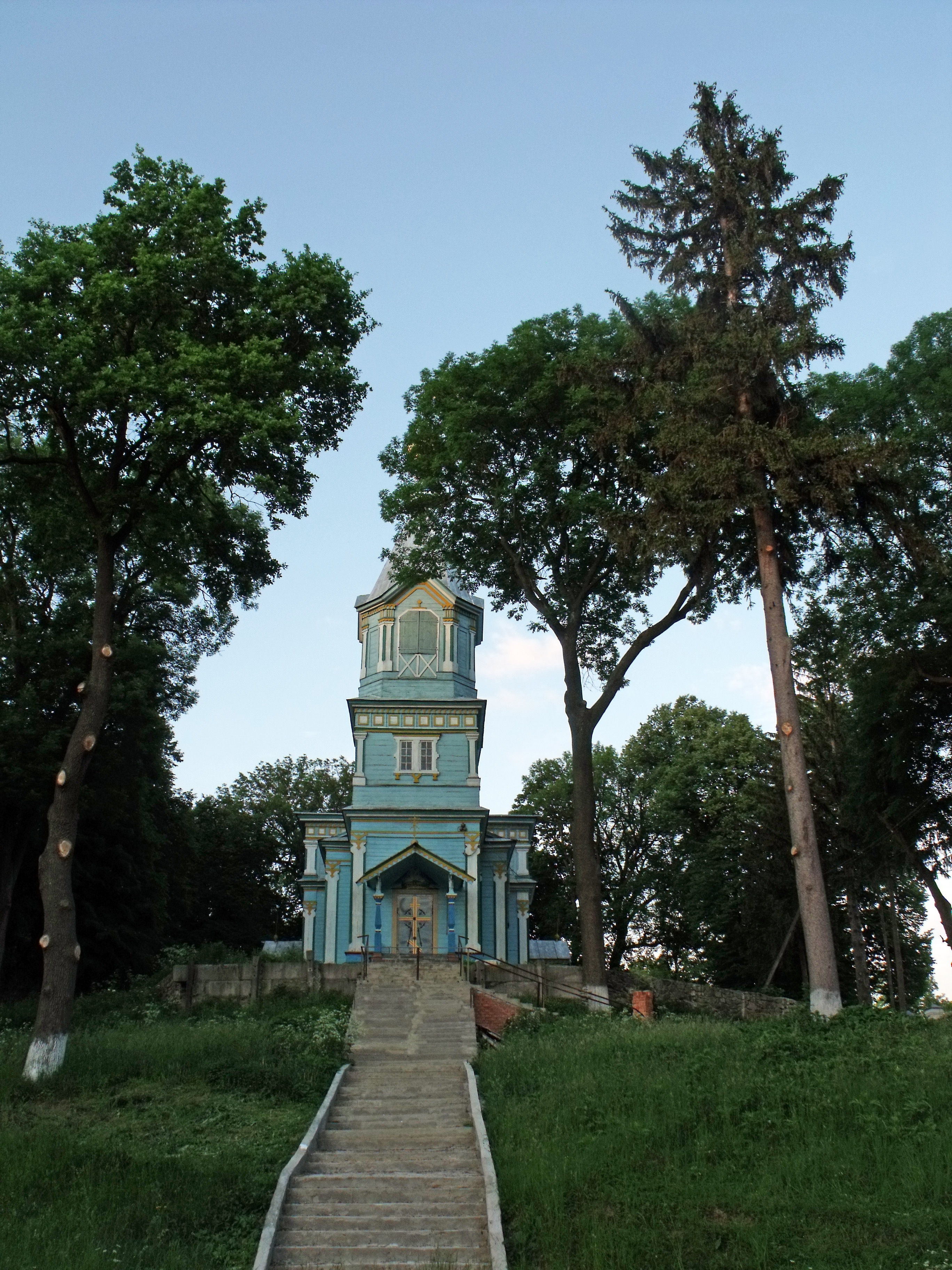 Вінницький район с. Лука-Мелешківська, парк "Мала Софіївка" - пам'ятка садово-паркового мистецтва